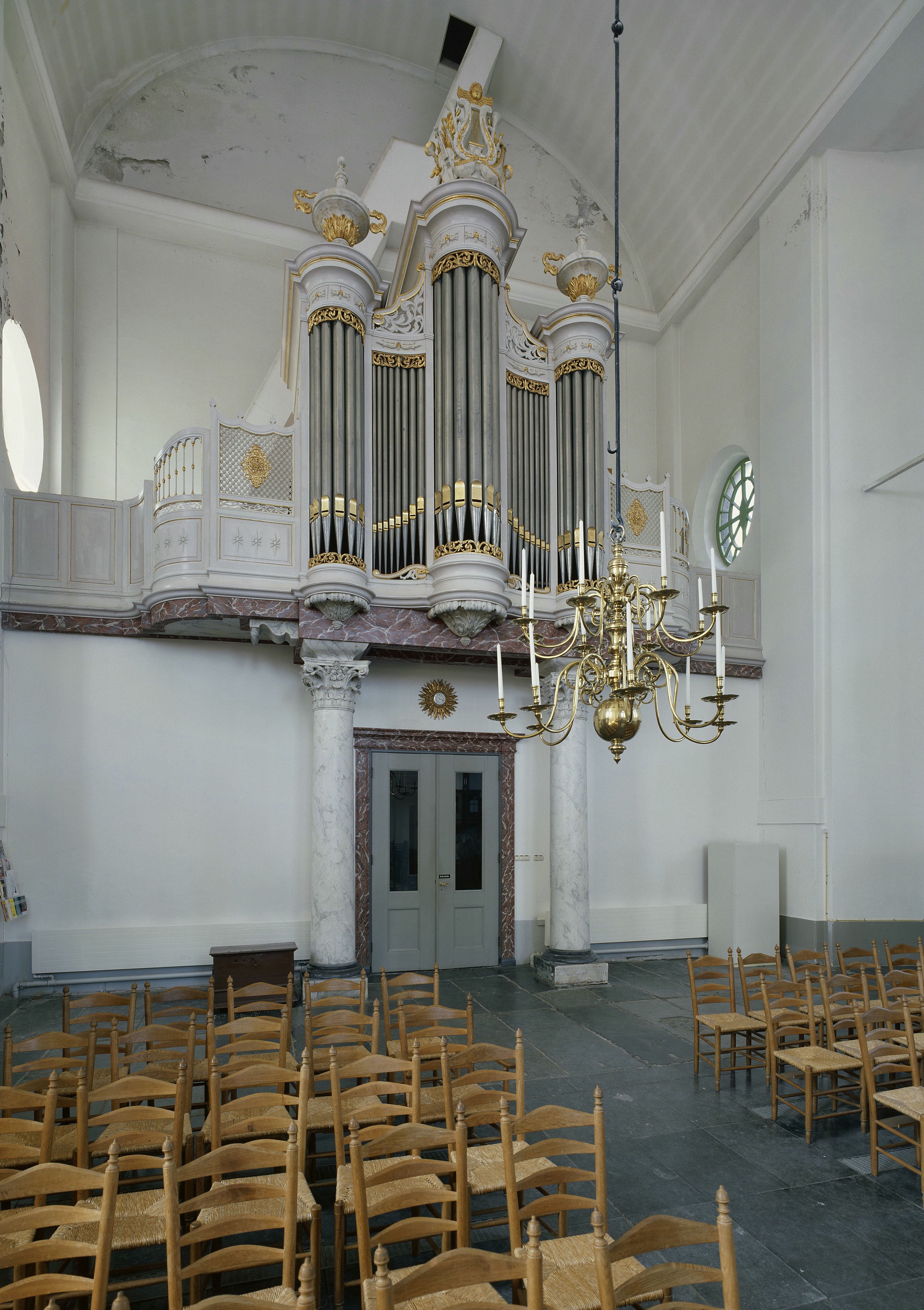 Grote kerk: Interieur, aanzicht orgel, orgelnummer 1652 (opmerking: Gefotografeerd voor Het Historische Orgel in Nederland 1865-1872)